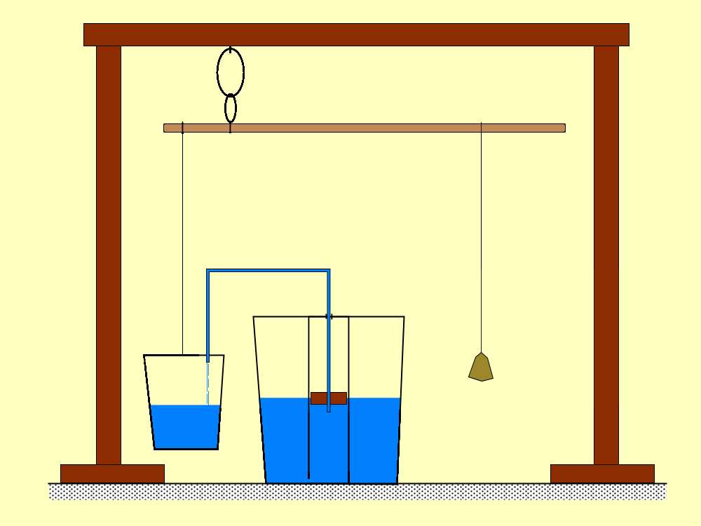 Schéma d'horloge à eau sur balance. Le flux régulier d'eau est obtenu à partir d'un siphon puisant l'eau à une hauteur constante par rapport au niveau.